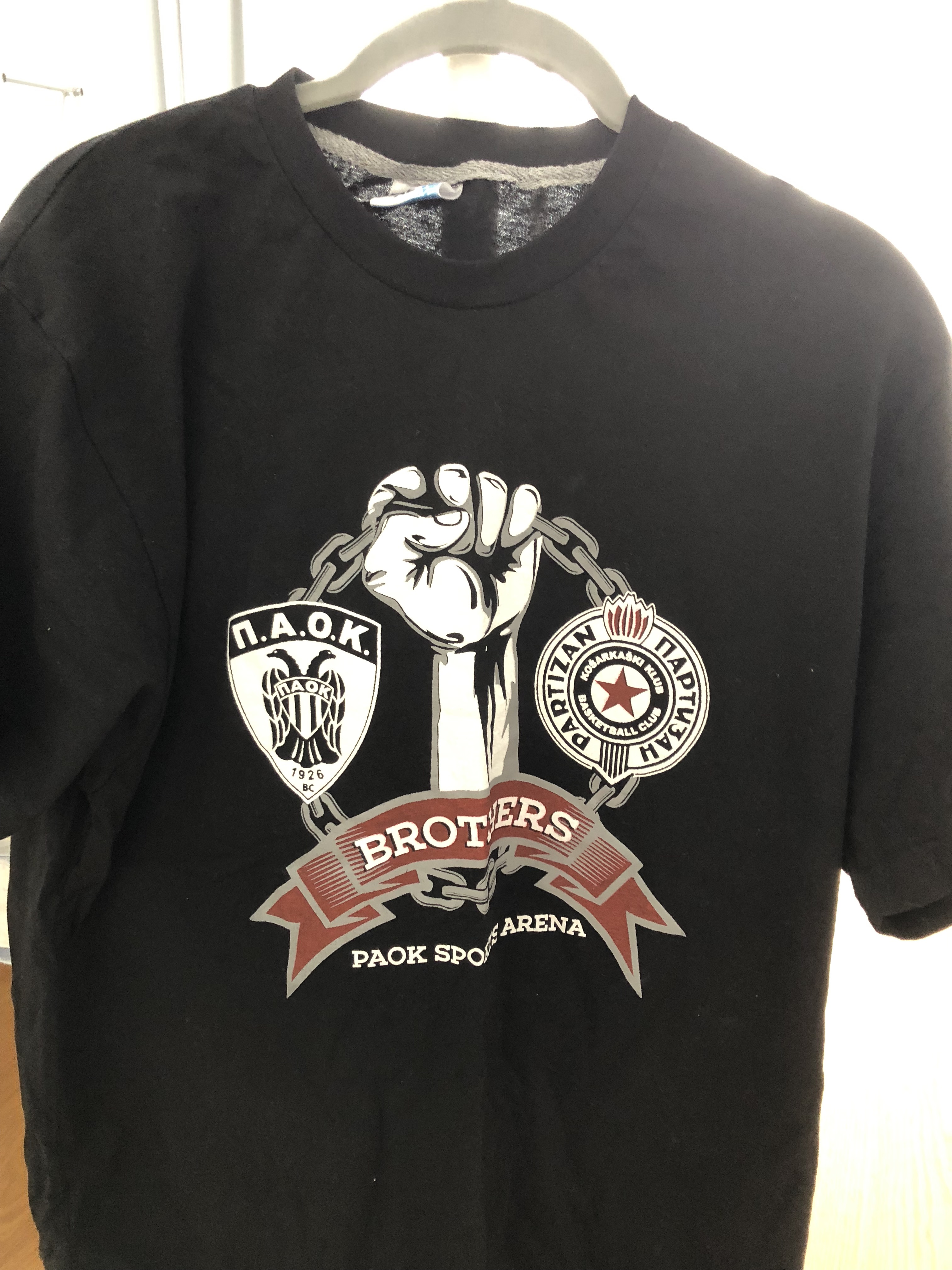 T-Shirt zur PAOK/Partizan Fanfreundschaft